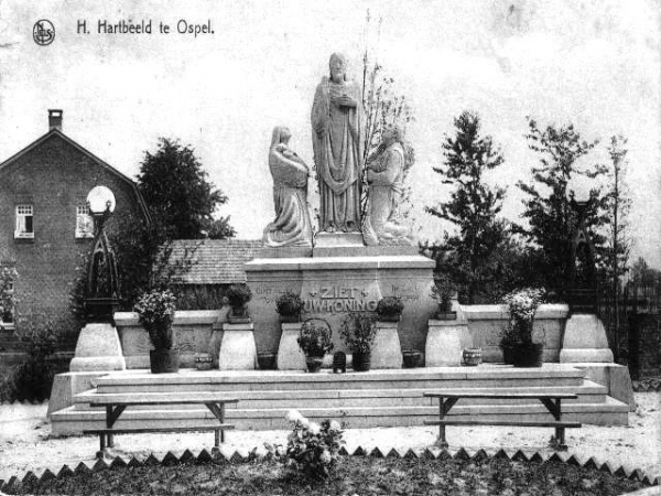 Heilig Hartbeeld (1926) in Ospel, door Albert Verschuuren